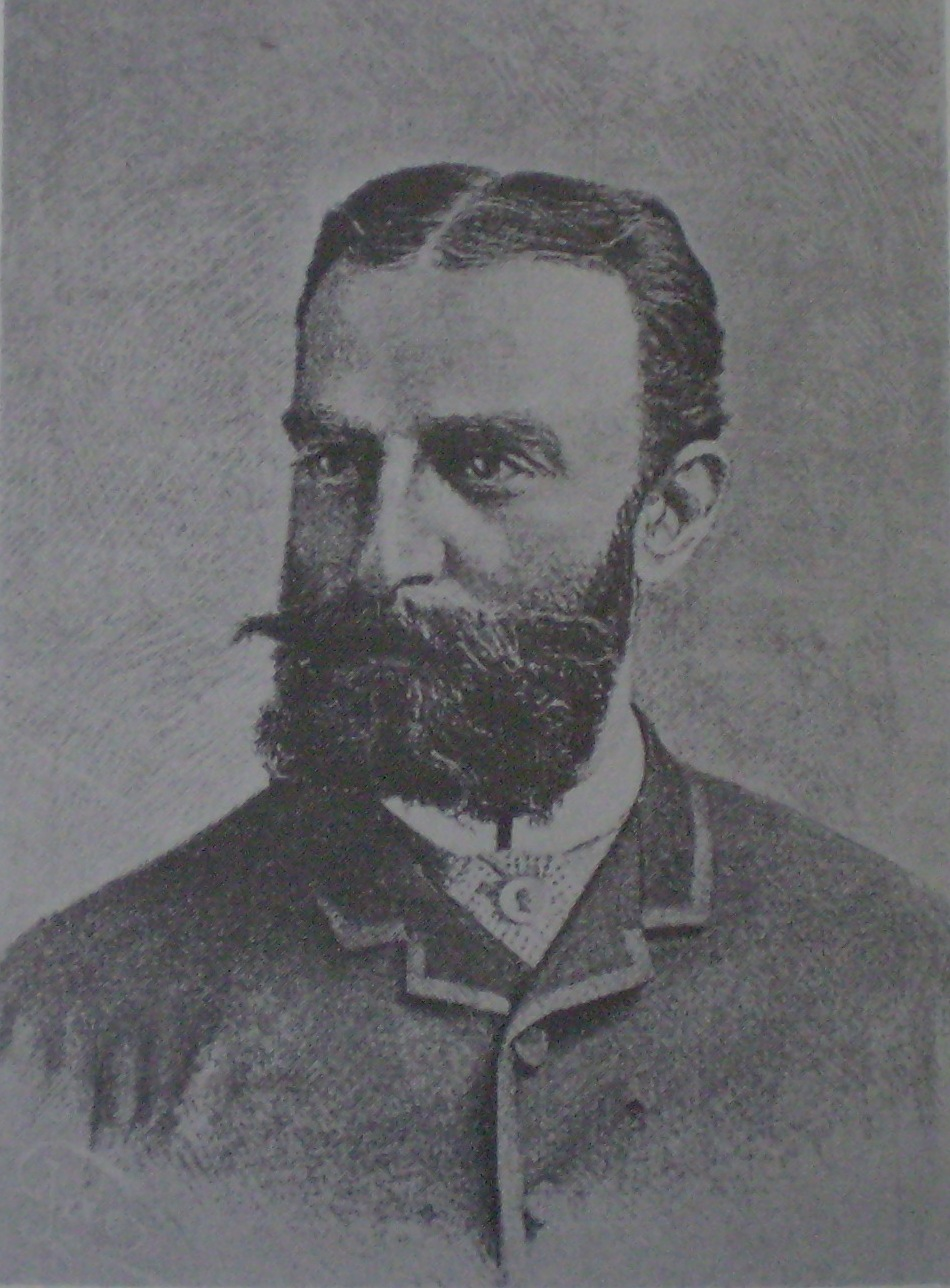 Ignacio Pirovano. Dibujo de Cao